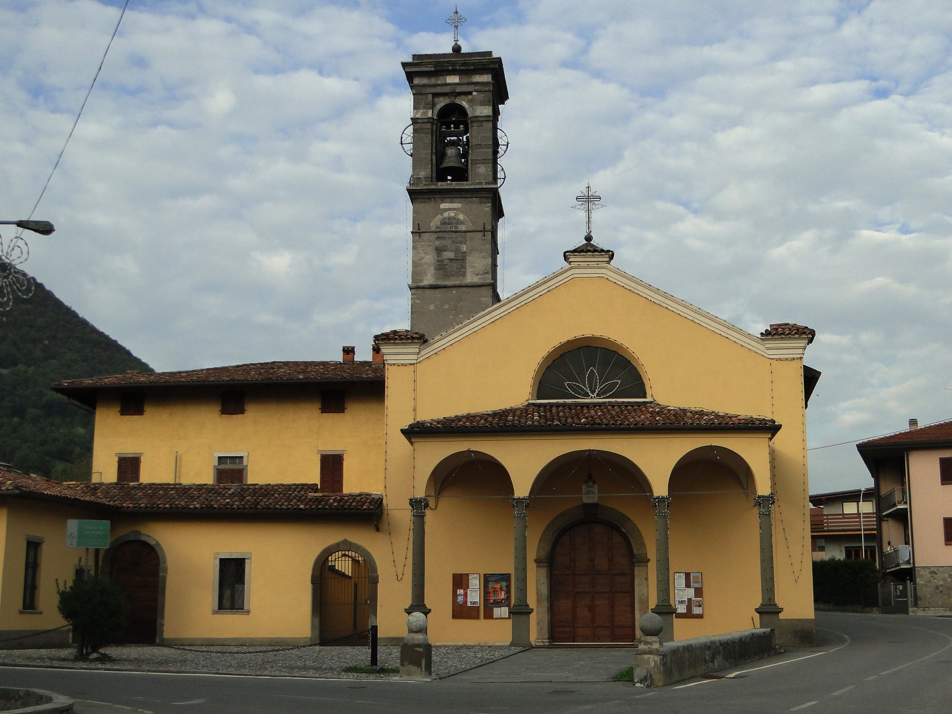 Desenzano al Serio, fraz. di Albino (BG), parrocchia san Pietro